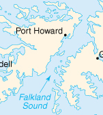 Fragment uit WorldFactbook kaart.